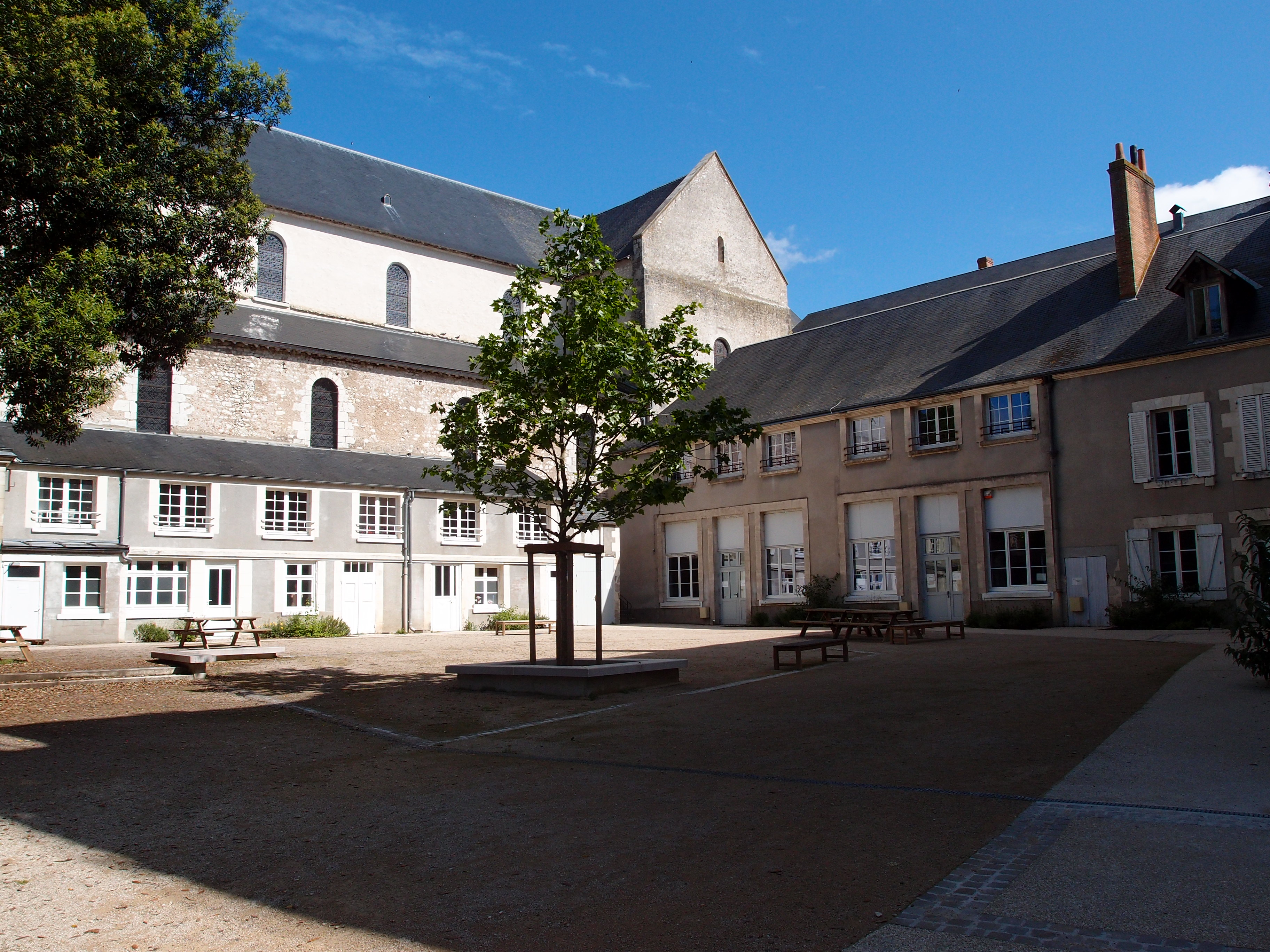 Le lycée reprend le plan de l'ancien cloître de l'abbaye de Beaugency. L'abbatiale apparaît à l'arrière-plan, à gauche de l'image. Juillet 2016